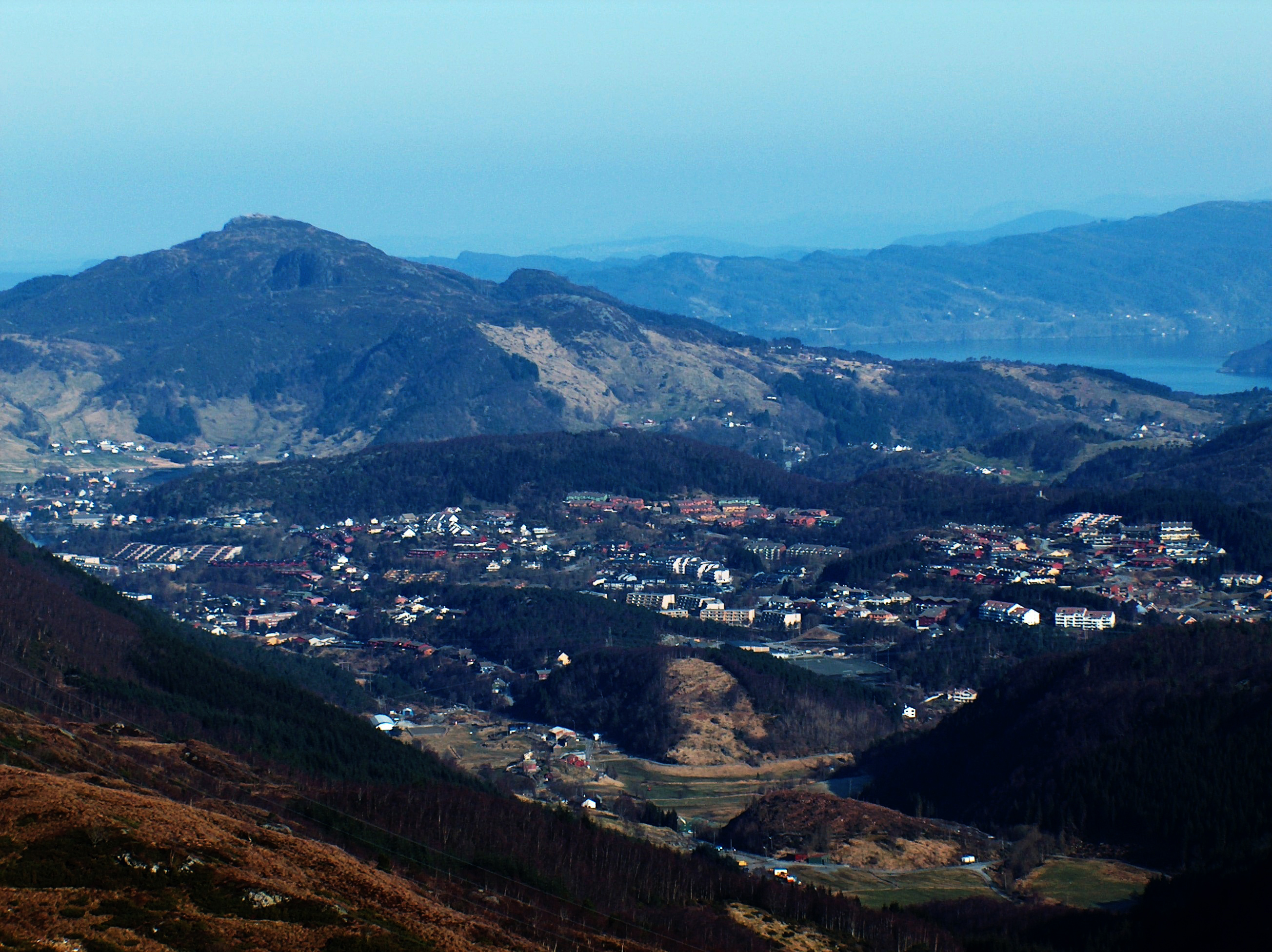 Åsane, Bergen